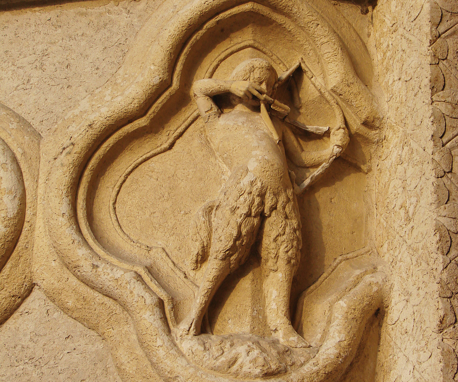 Le sagittaire (Sagittarius) ;un des signes du zodiaque complet figurant sur le portail gauche de la façade de la cathédrale d'Amiens.